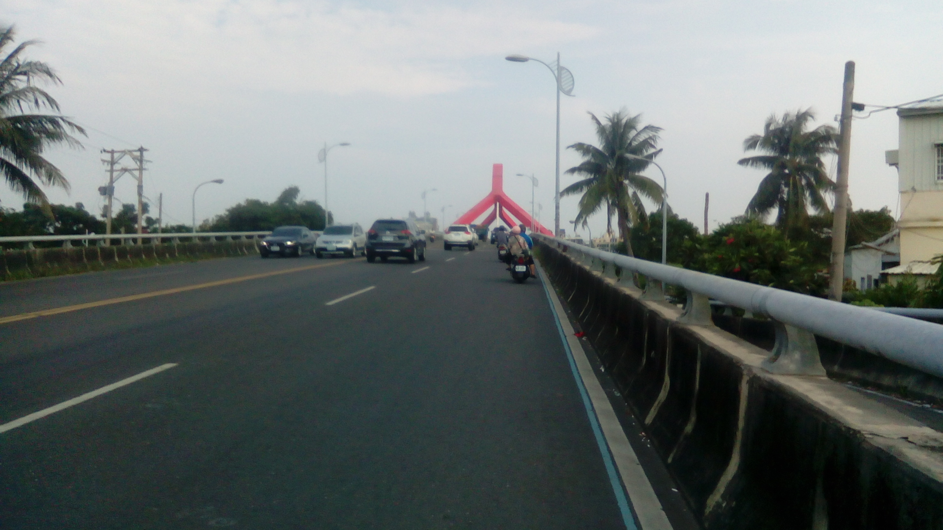 連結新園與東港的進德大橋(拱橋造型)